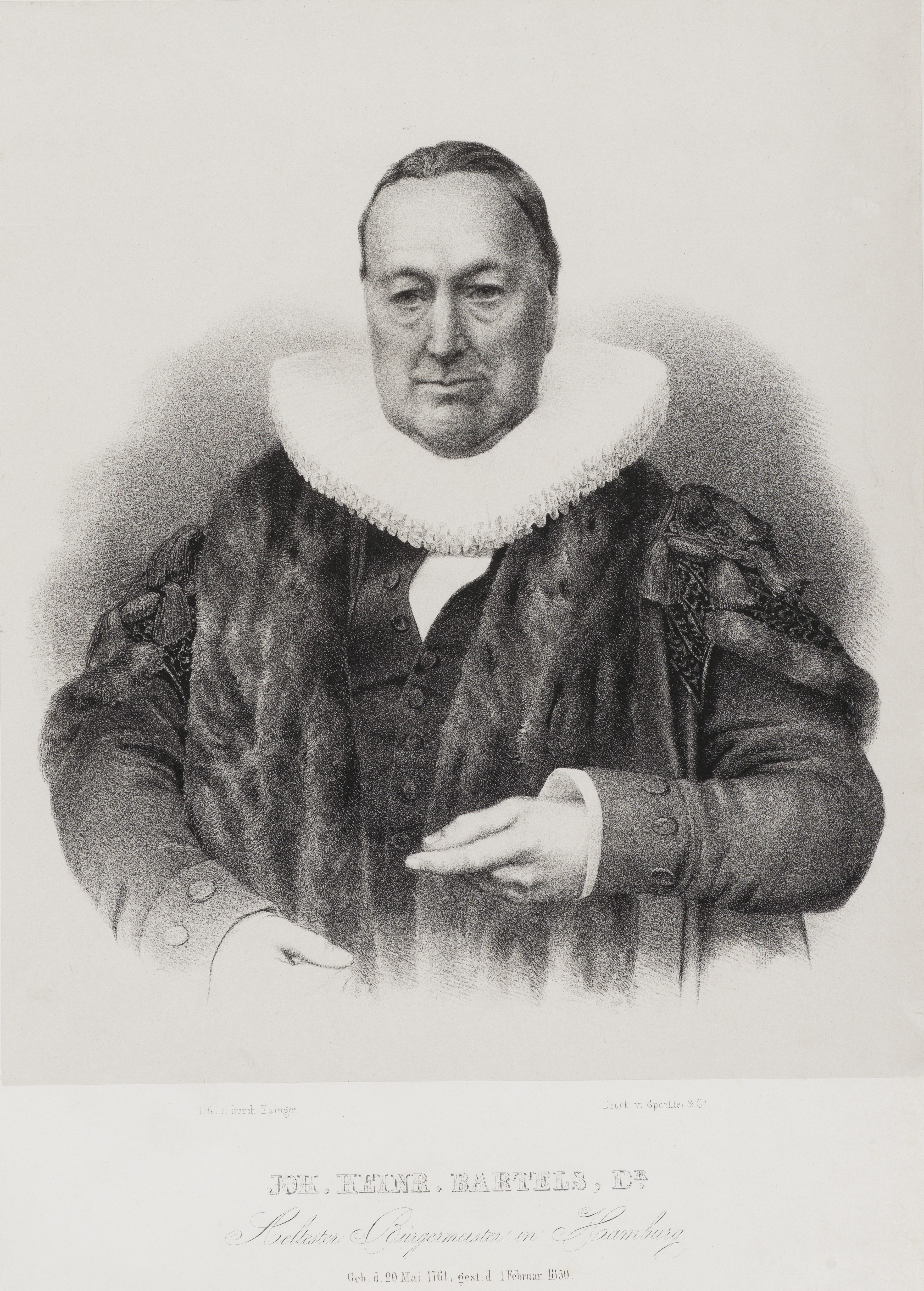 Porträt von Johann Heinrich Bartels